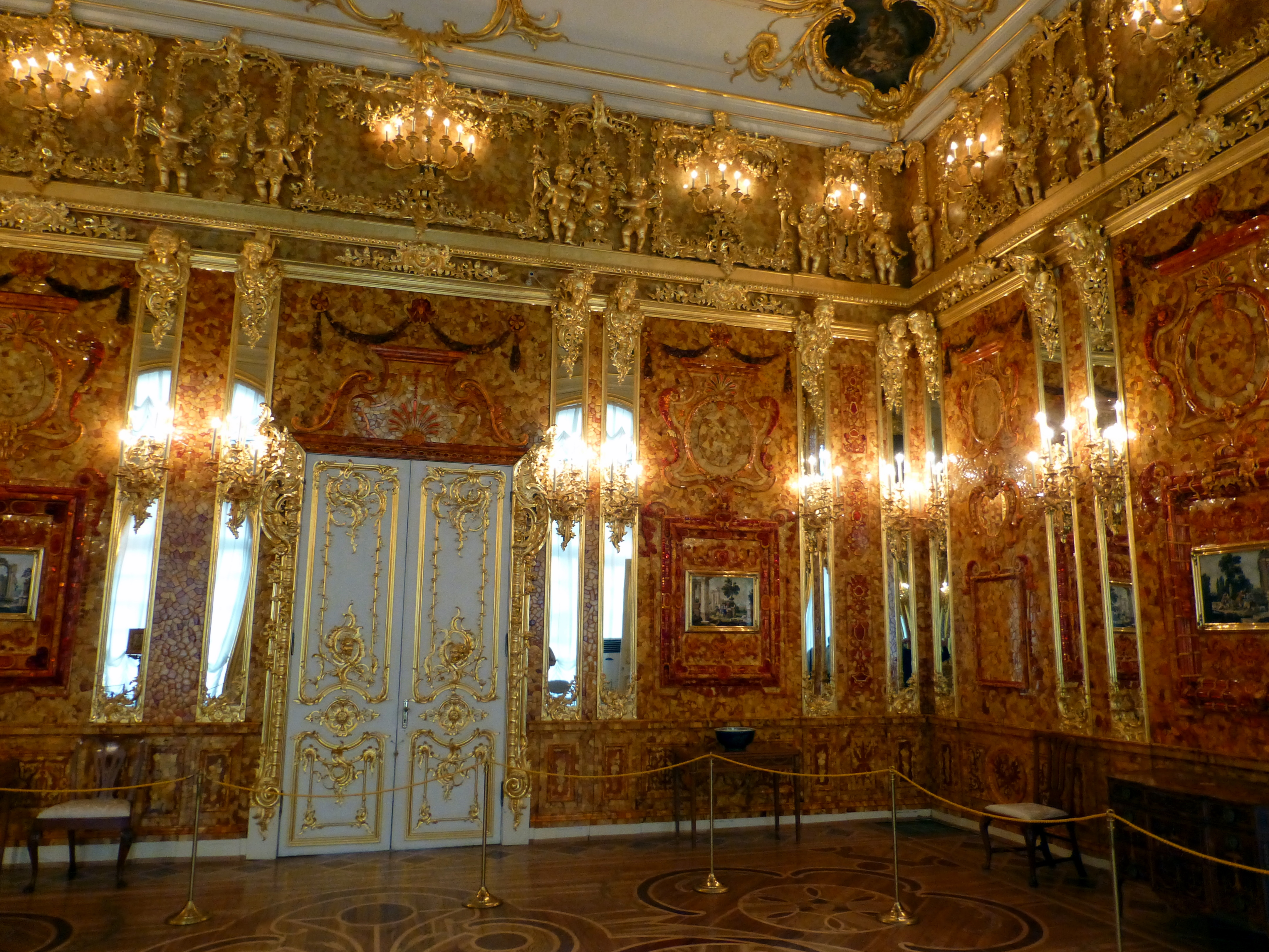 St. Petersburg - Das Bernsteinzimmer am 11.Mai 2012 --- The Amber Room on May 11, 2012 --- Янтарная комната на 11 мая 2012